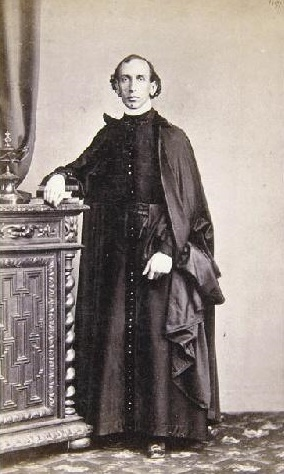 Tristán Medina, fotografía de J. Laurent, Museo de Historia de Madrid